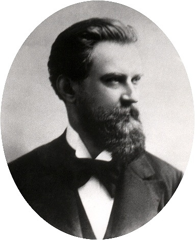 František Mareš (1862 - 1941), Český pedagog.